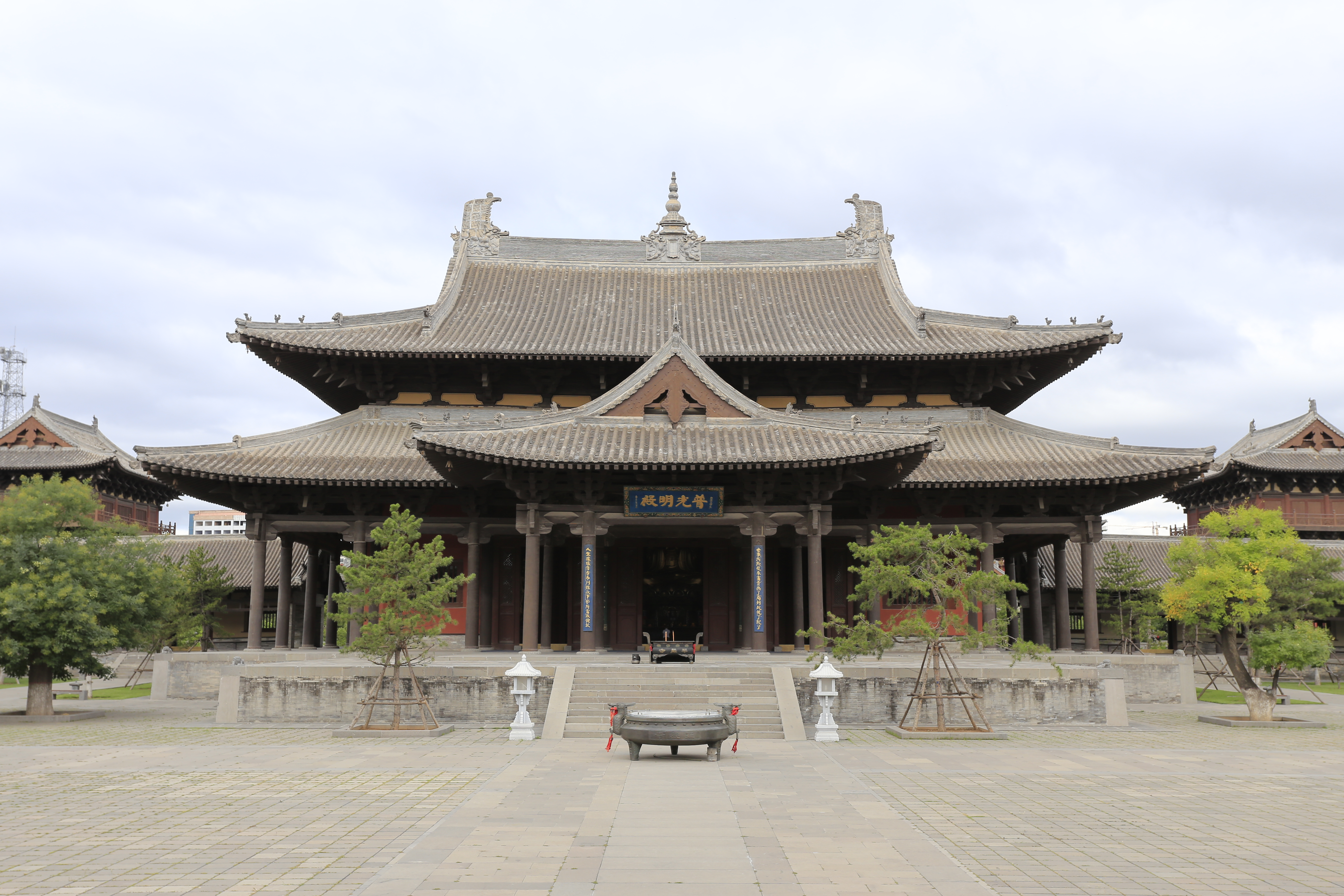 大同华严寺—— 普光明殿